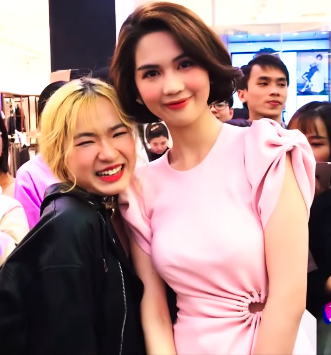 Ngọc Trinh, ảnh chụp màn hình từ video của Nhà Của Méo (screen capture from video of Nhà Của Méo).